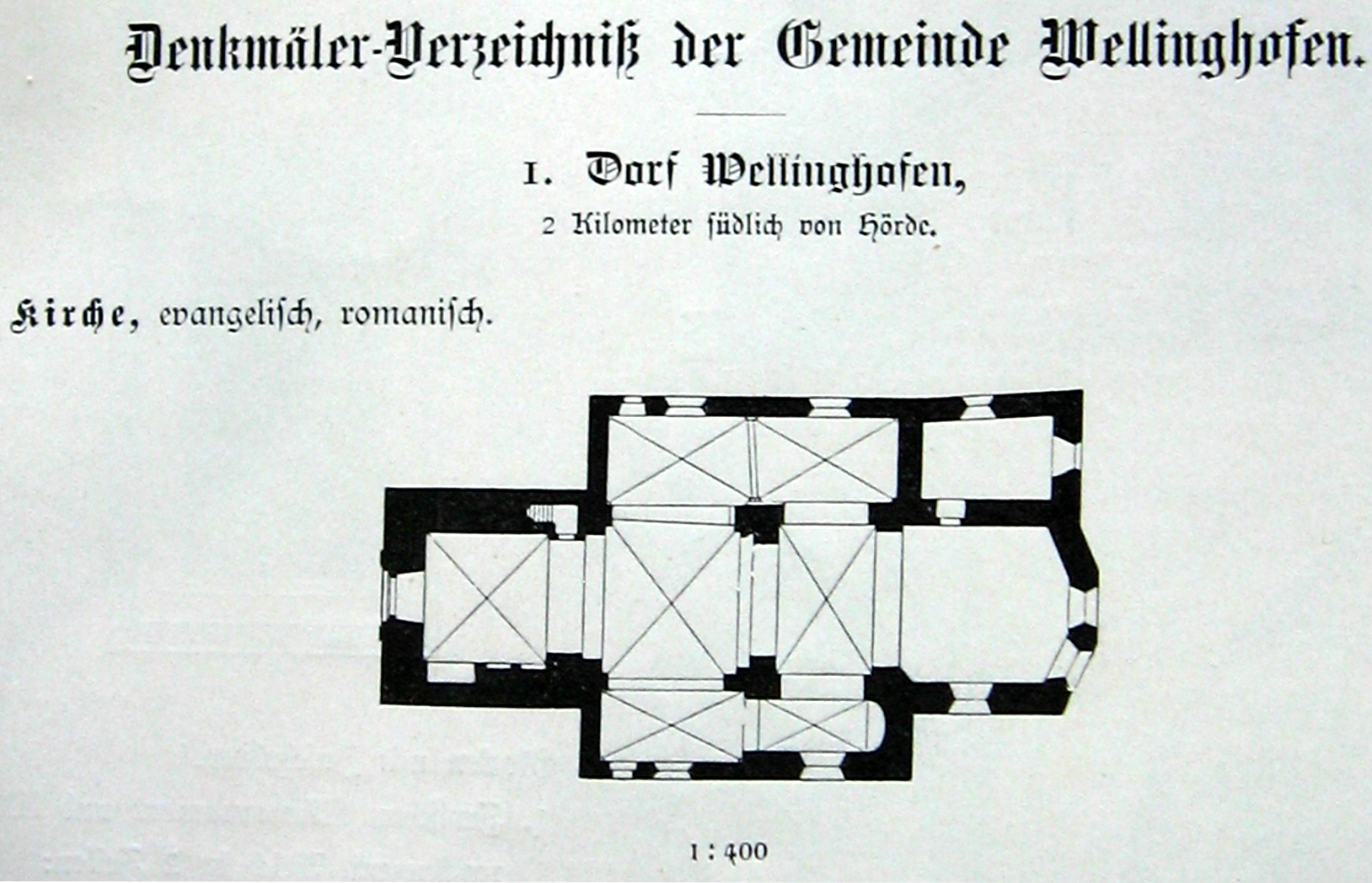 Dortmund, Wellinghofen, Kirche evangelisch romanisch